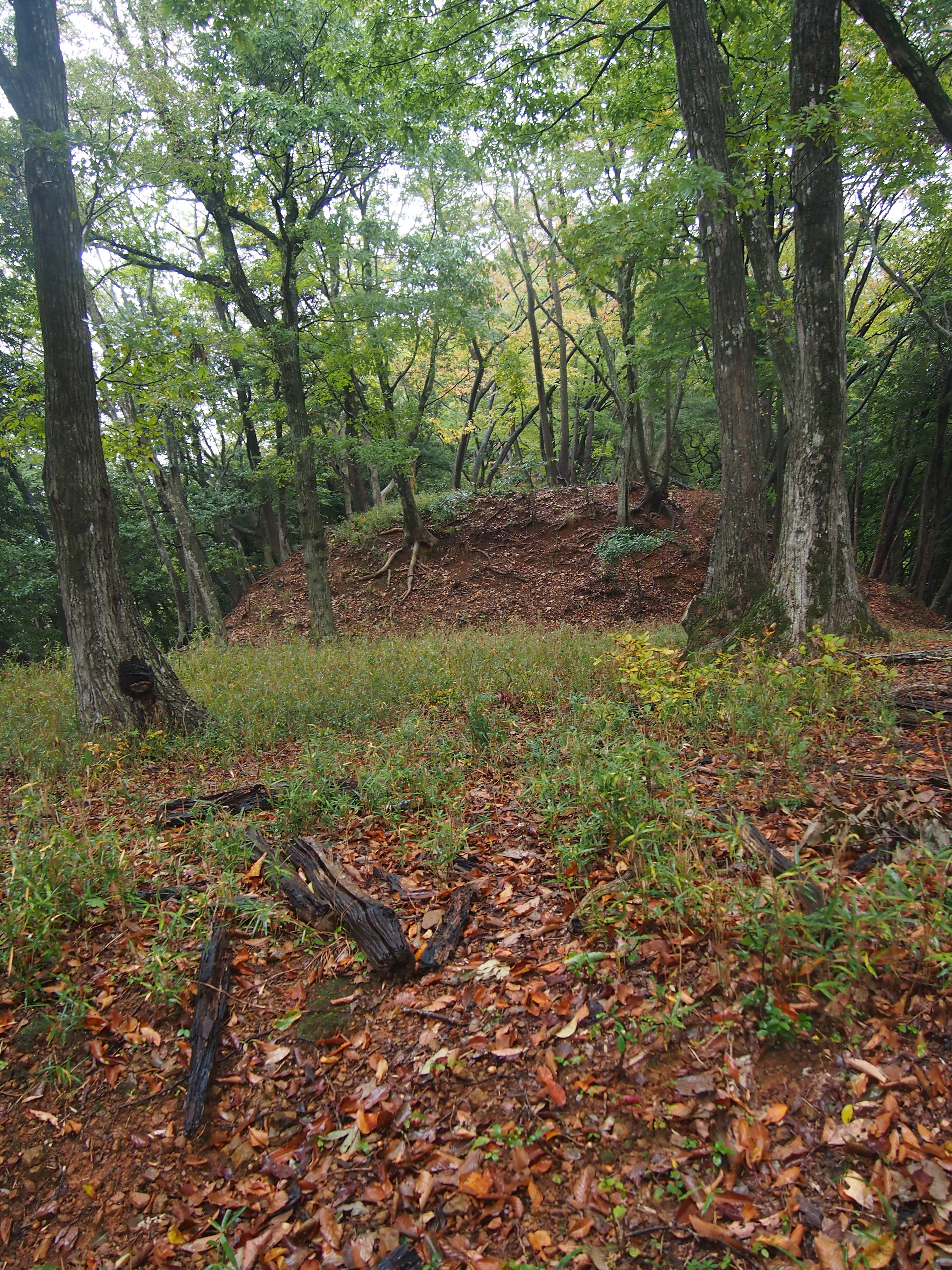 国吉城の北西尾根の連郭。